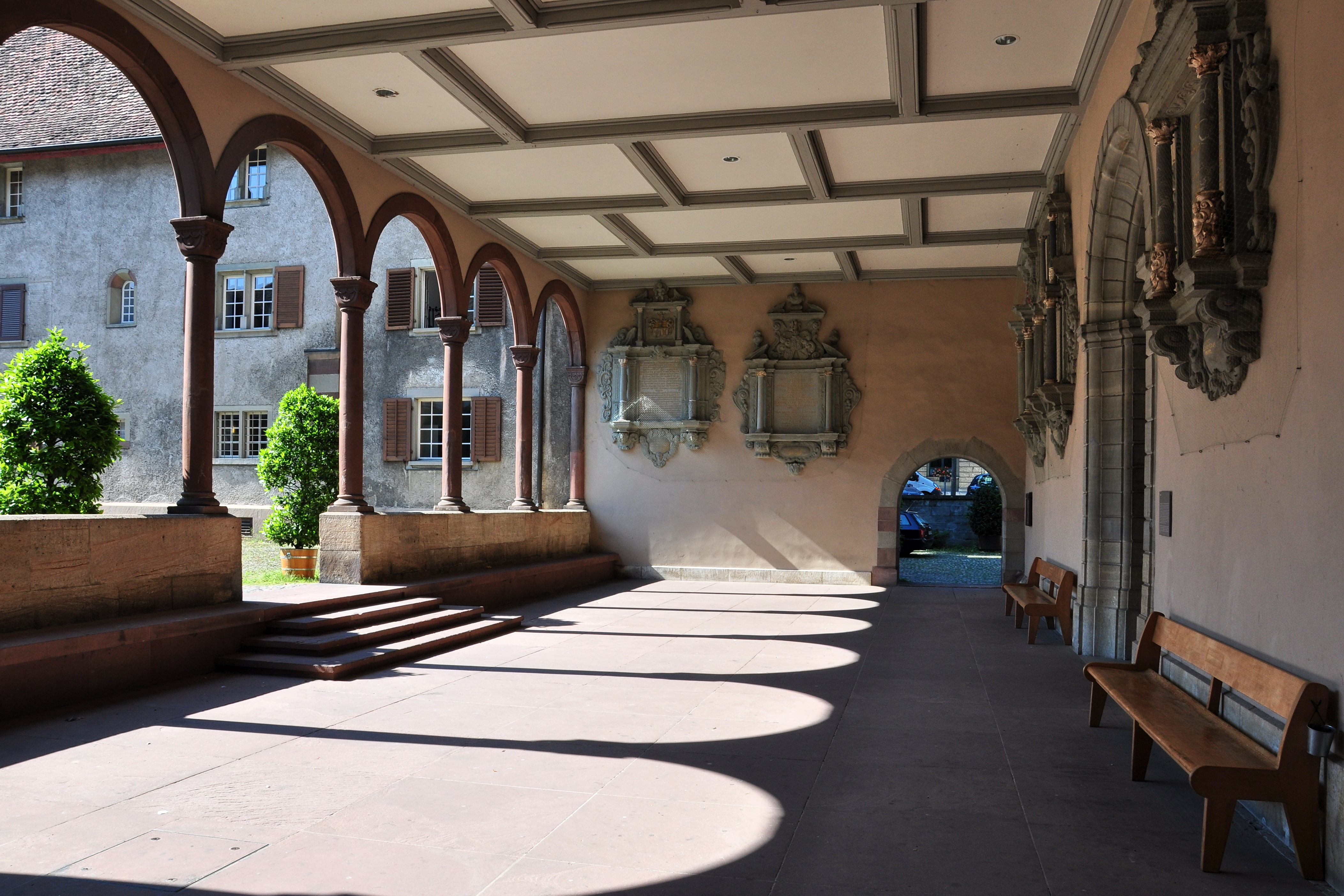 Vorhalle des Münsters in Schaffhausen (Switzerland)